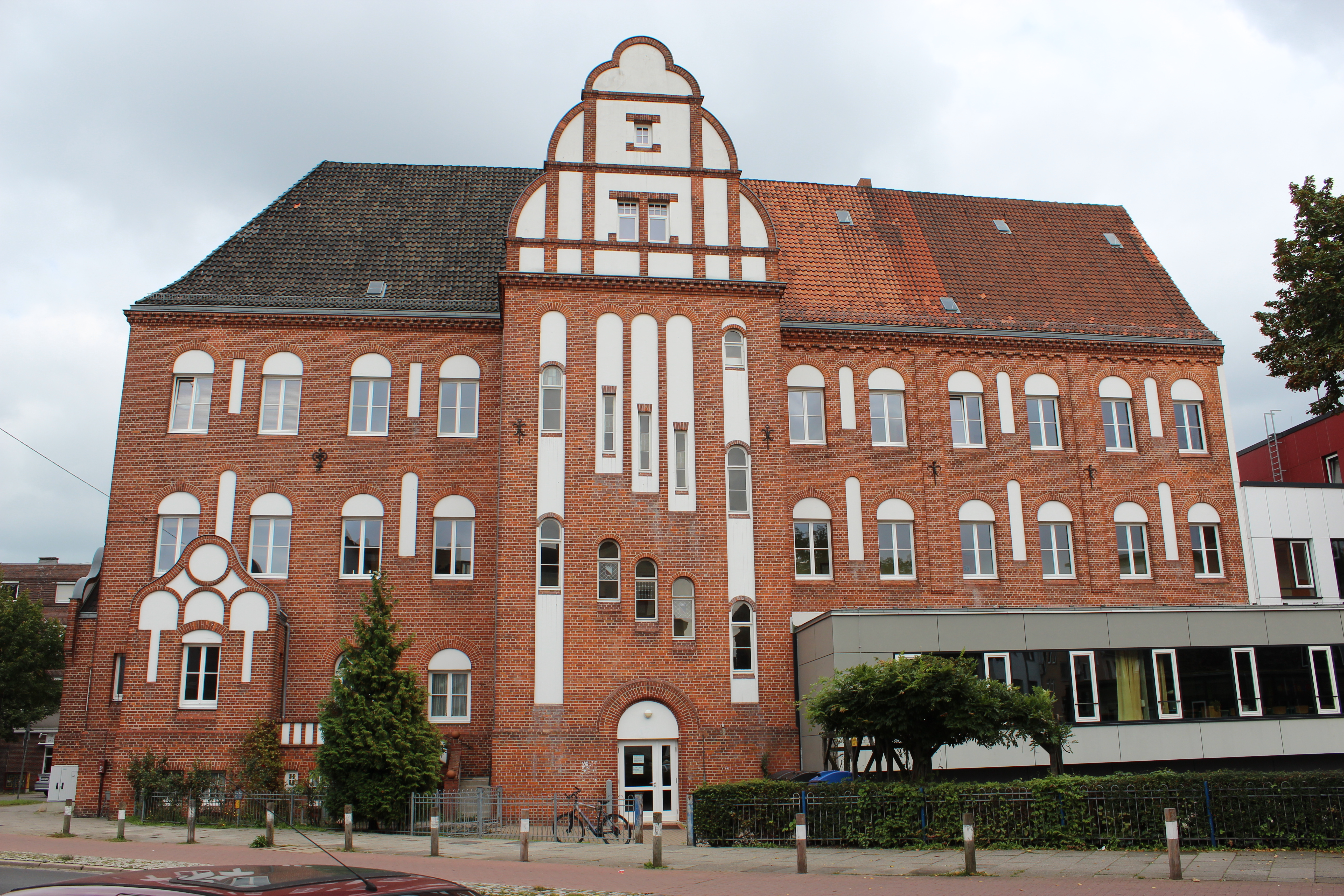 Oberschule, Allgemeine Berufsschule in Bremen, Steffensweg 171 / Bremerhavener Straße.Das abgebildete Objekt ist ein geschütztes Kulturdenkmal in der Freien Hansestadt Bremen, mit der Nr. 1170 beim Landesamt für Denkmalpflege registriert.